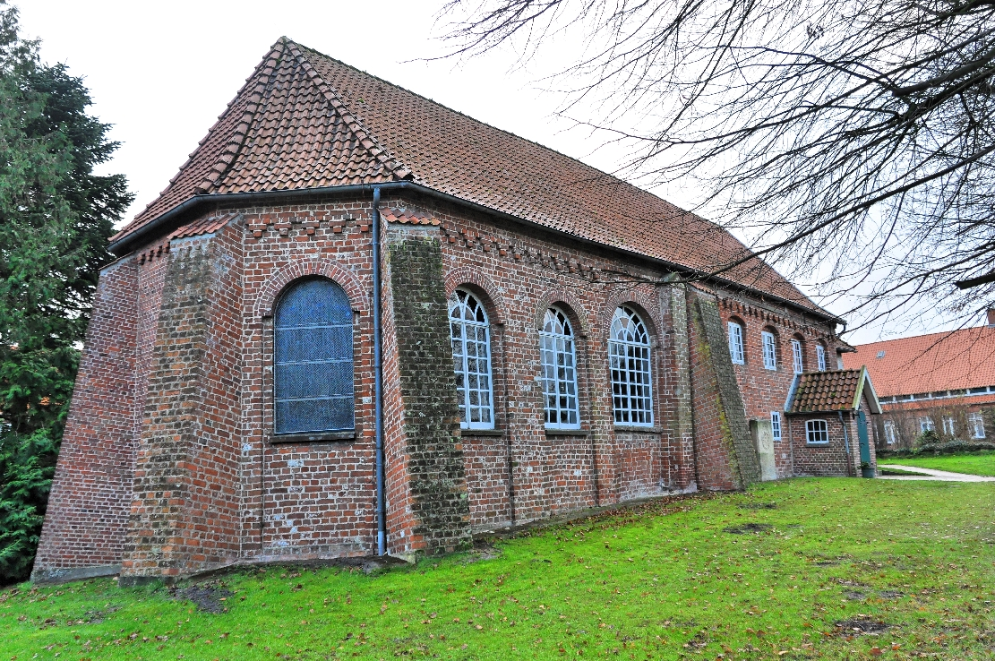 Neuenwalde 2012